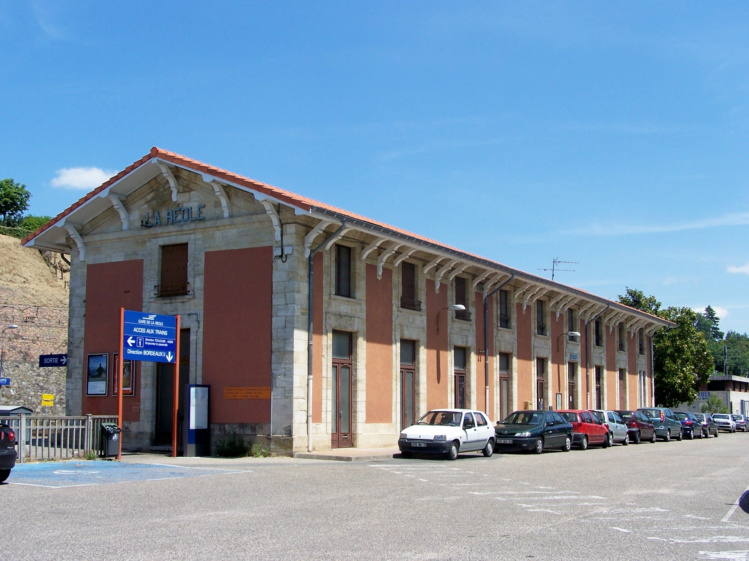 Gare de La Réole, Gironde, France